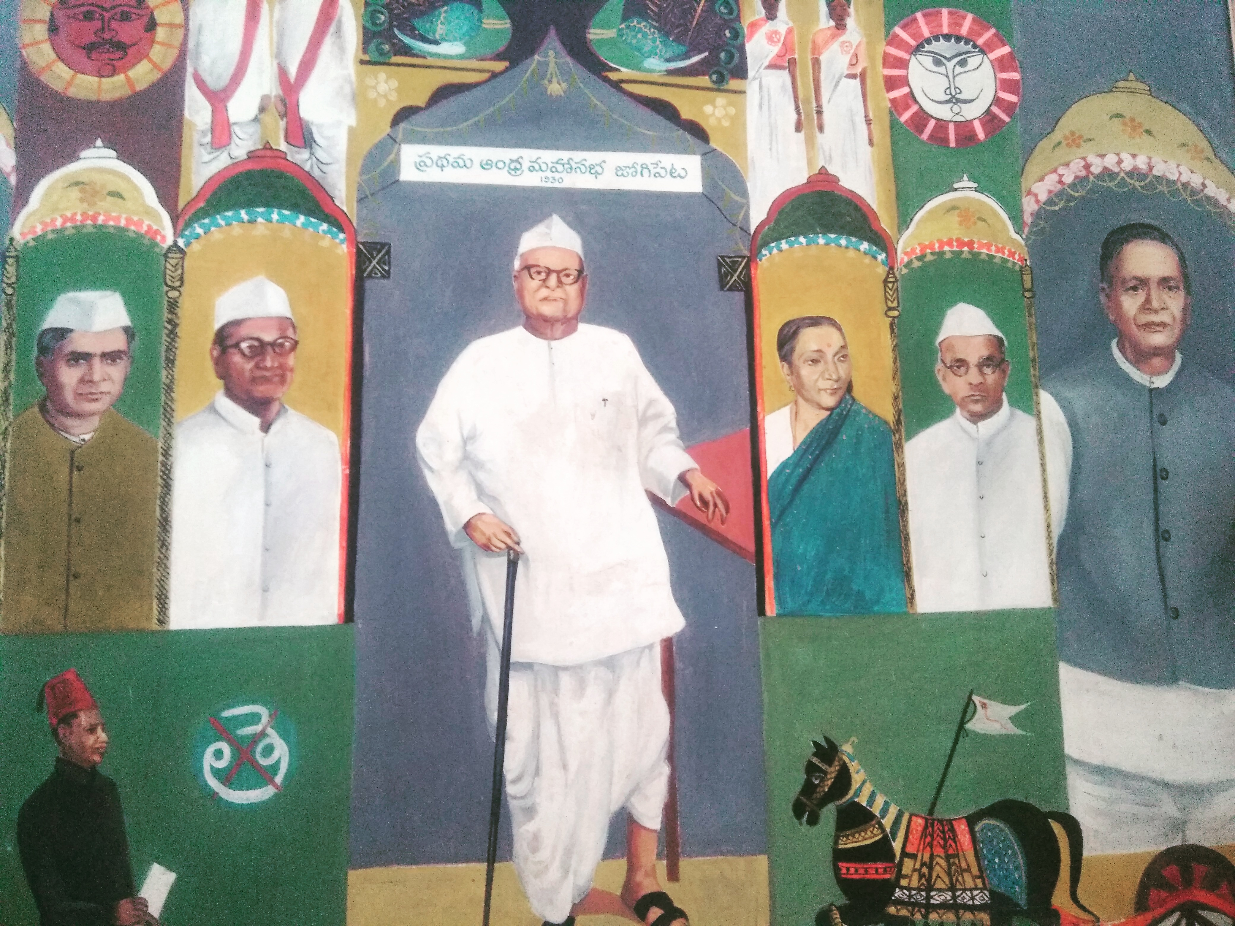 Andramahasabha painting: During Nizam's rules a covention was held at Jogipet in 1930.The Andra mahasabha was demanding proper status to telugu pepole and their languages. ప్రథమ ఆంధ్ర మహాసభ: నైజాం రాష్ట్రంలొని తెలుగు వారికి మరియు తెలుగు భాషకి తగినంత ప్రాధాన్యత ఇవ్వాలని జోగిపేటలో 1930 లో జరిగిన ప్రథమ ఆంధ్ర మహాసభ . చిత్రకారుడు: ఎం. జయంత్.